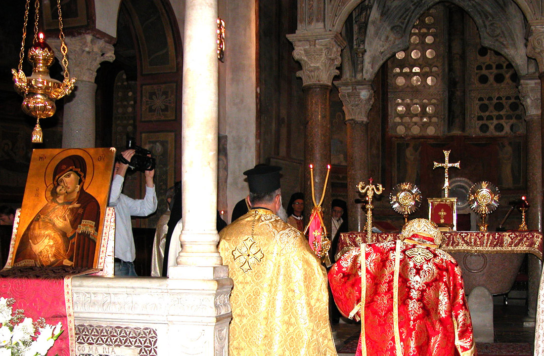 Gregorio III durante una Divina Liturgia